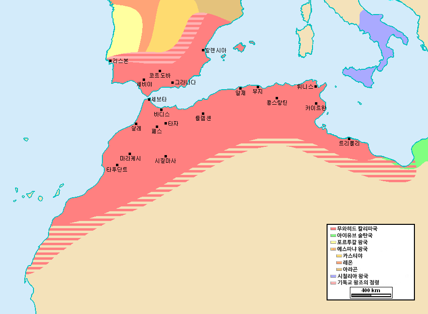 무와히드 칼리파국의 지도.